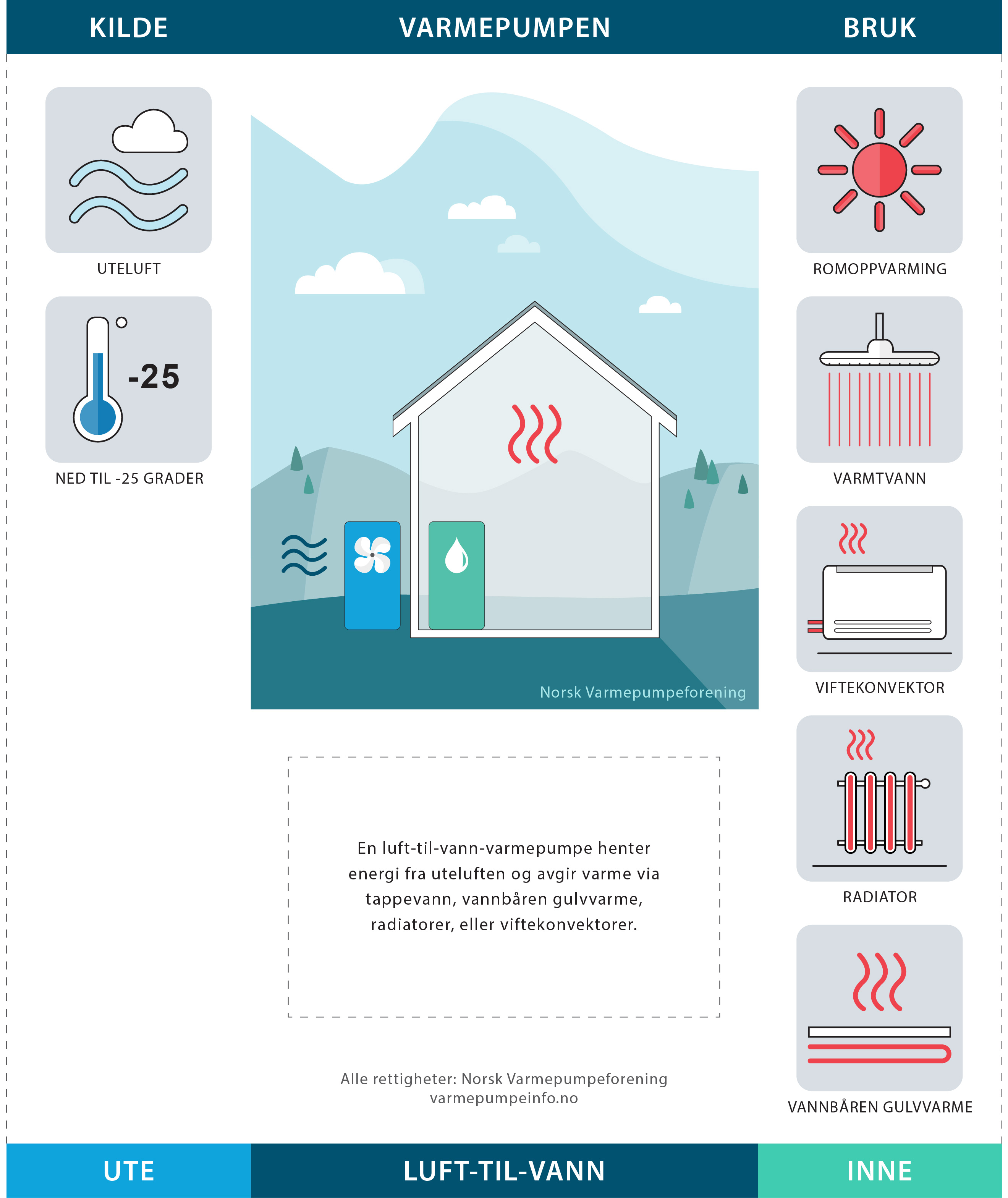 En luft-til-vann-varmepumpe henter energi fra uteluften og avgir varme via tappevann, vannbåren gulvvarme, radiatorer, eller viftekonvektorer.